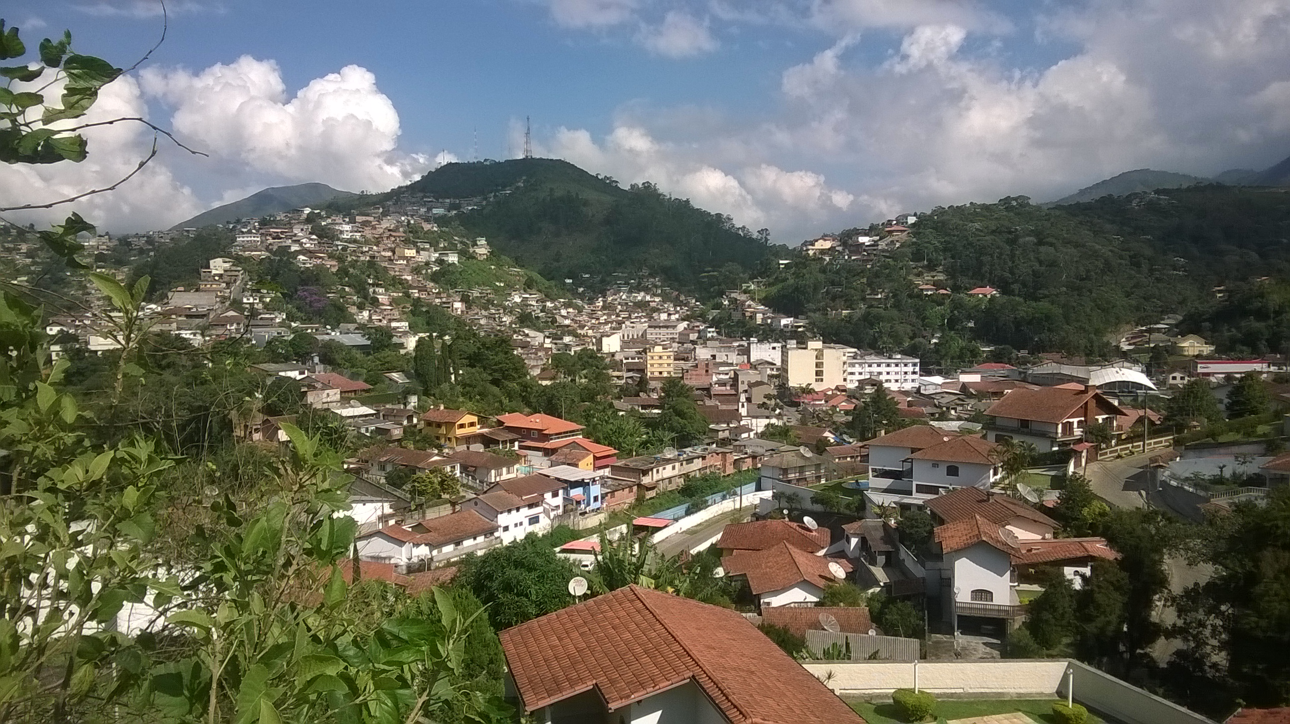 Vista parcial do bairro Barra do Imbuí, localizado em Teresópolis, RJ.